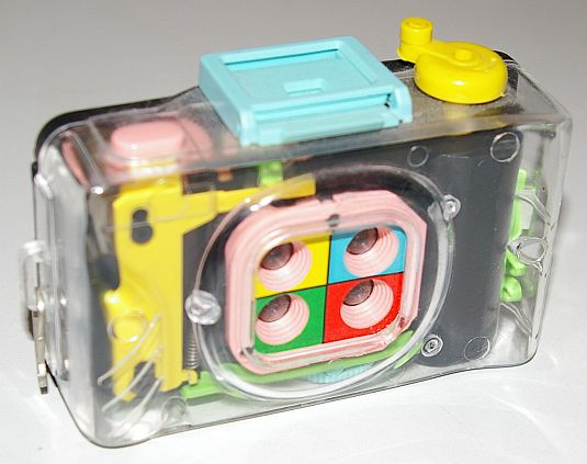 LOMO-Kamera mit Vierfach-Objektiv